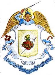 Escut de la Congregació Claretiana, tal com surten a les constitucions de 1914.